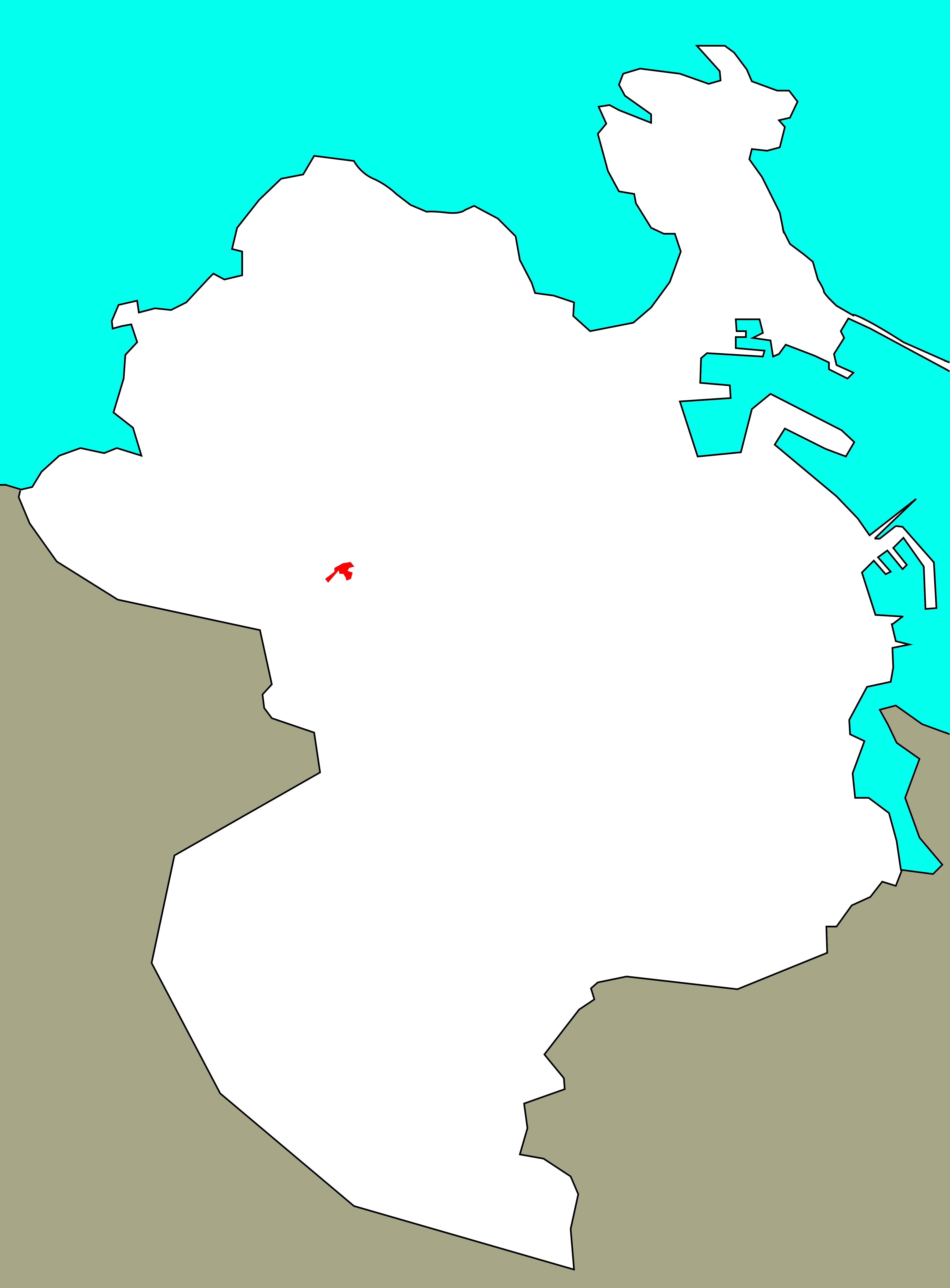 Situación de San Xosé no concello da Coruña.[1]